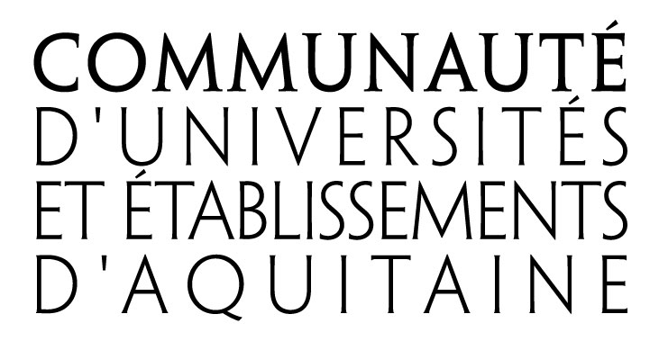 Logo officiel de la communauté d'universités et établissements d'Aquitaine